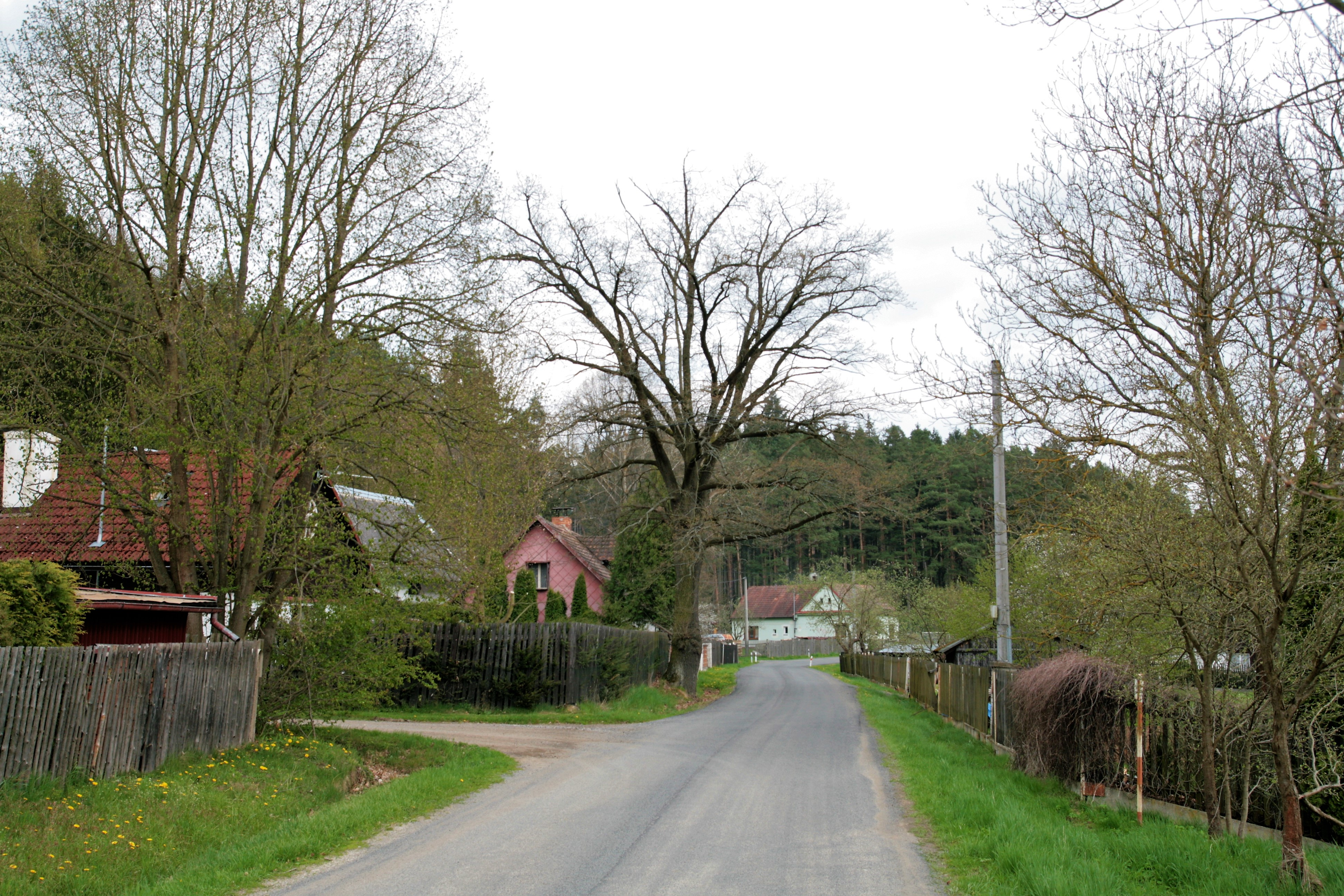 Vesnice Bezděkov, část města Švihov v okrese Klatovy. Průhled ulicí od západu, na spojnici vesnic Třebýcinka a Hráz. Vlevo dům čp. 8, v pozadí dům čp. 16 spadající úředně pod Hráz, část obce Měčín.